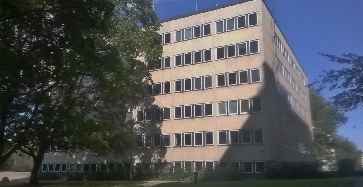 Kaisaniemen virastorakennus. Rakennuksessa sijaitsee Kotuksen, Vähemmistövaltuutetun, Taiteen edistämiskeskuksen, Kulttuuripoliittisen tutkimuksen edistämissäätiön toimistot. Aiempi Ilmatieteen laitoksen Säätalo.